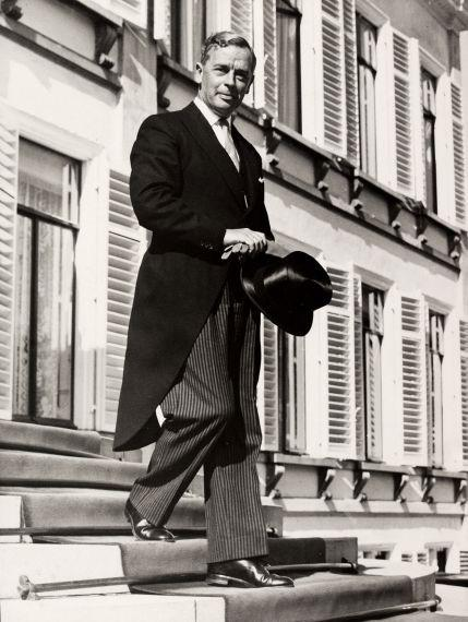 Ir. S. Visser is op paleis Soestdijk tot minister van defensie beëdigd door de Koningin. Op de foto verlaat hij het paleis. 7 september 1959.